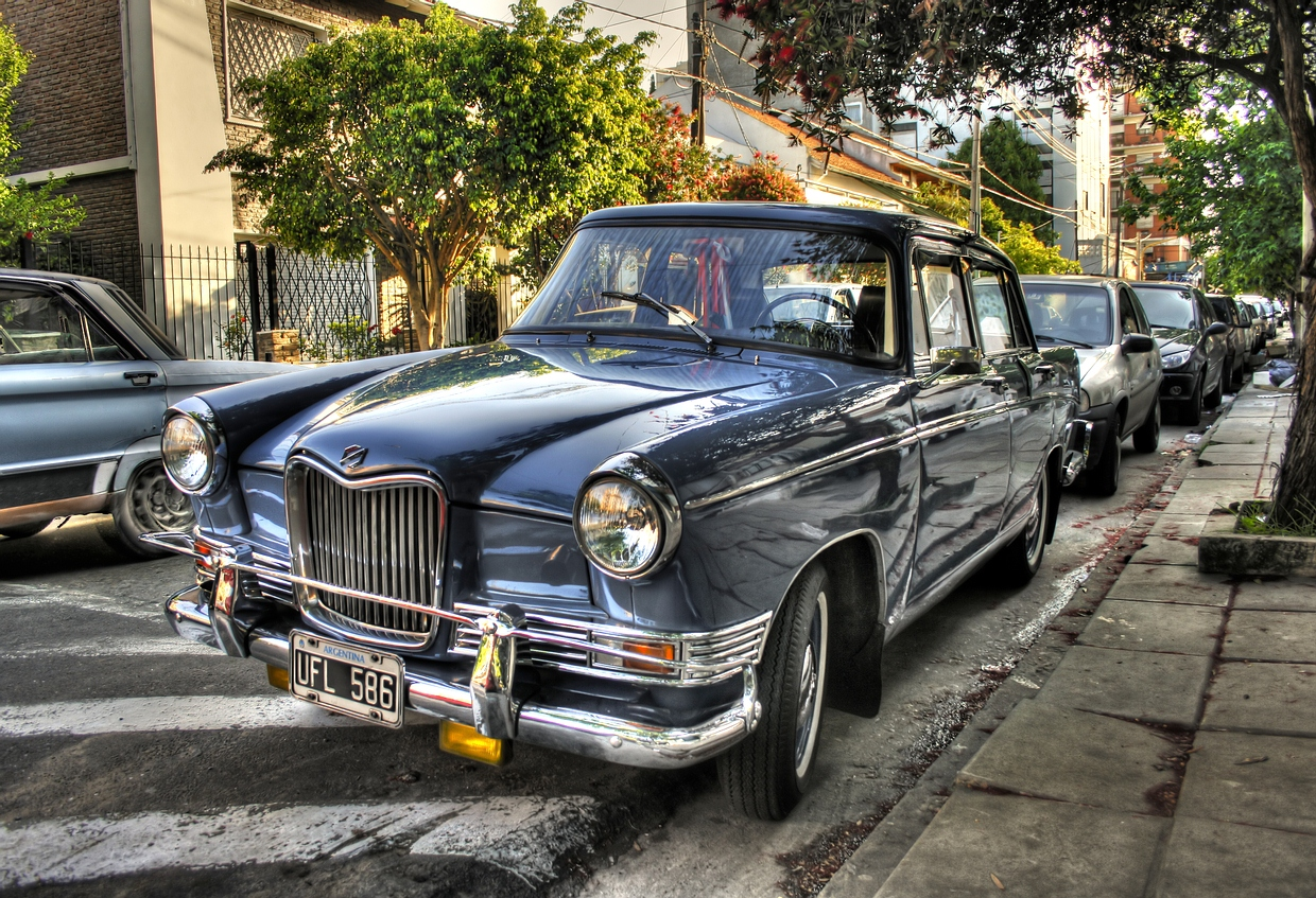 An Argentine "Siam di Tella" (c.1965).